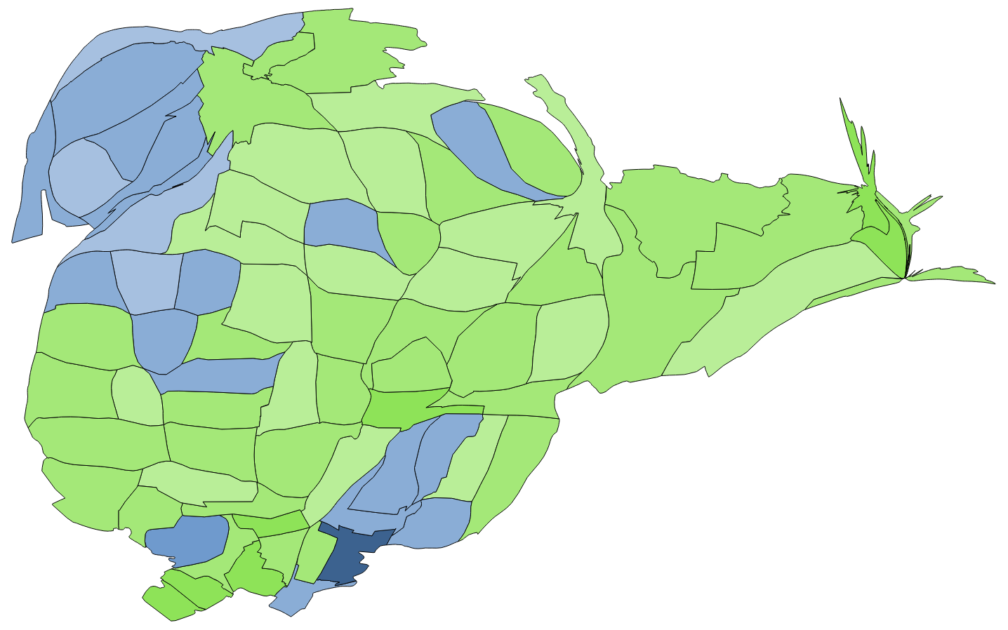 顏色對照表